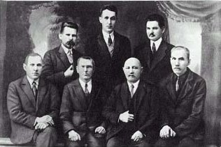 Галоўная ўправа Таварыства беларускай школы (злева направа) у першым радзе: Міхась Пяткевіч, Фелікс Стацкевіч, Сяргей Паўловіч, Мітрафан Кепель; у другі радзе: Рыгор Шырма, Піліп Кізевіч, Мікалай Марцінчык